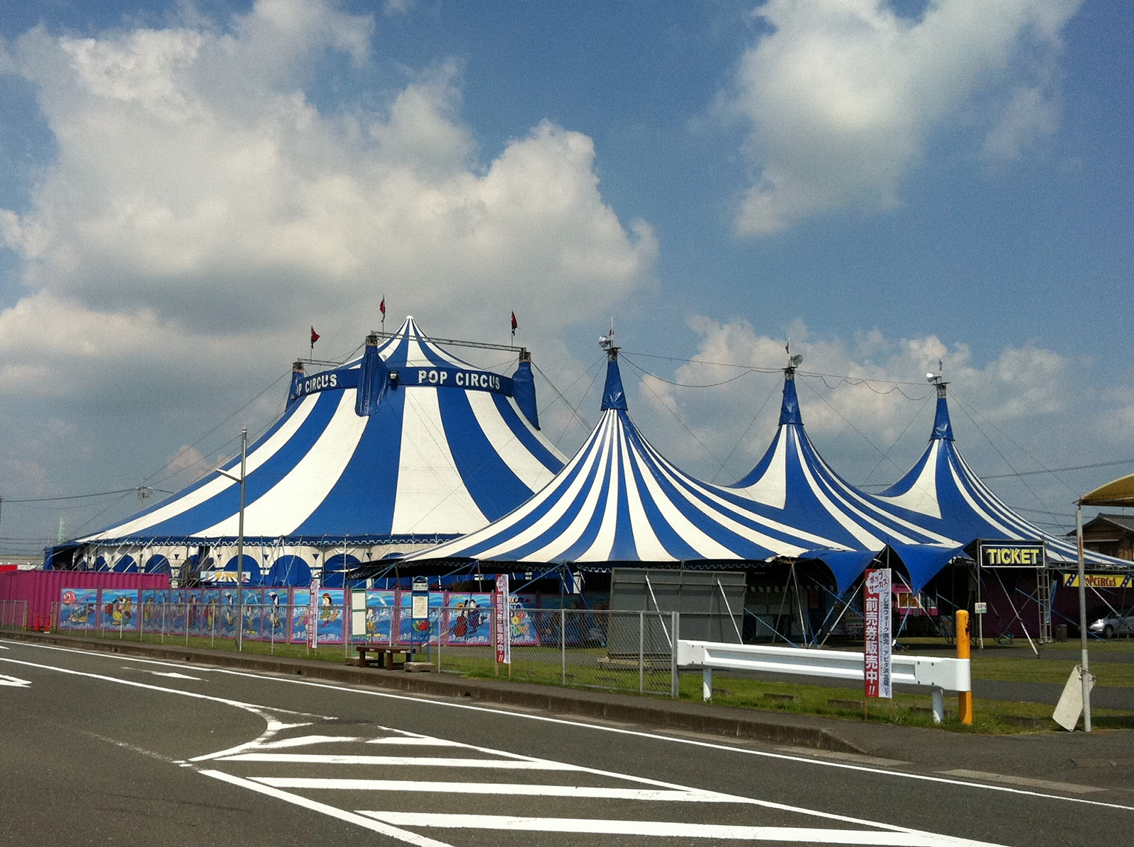 ポップサーカス浜松公演(プレ葉ウォーク浜北)の会場の模様。撮影日は休演日。公道上から撮影